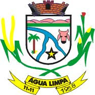 Brasão de Água Limpa, Goiás, Brasil.